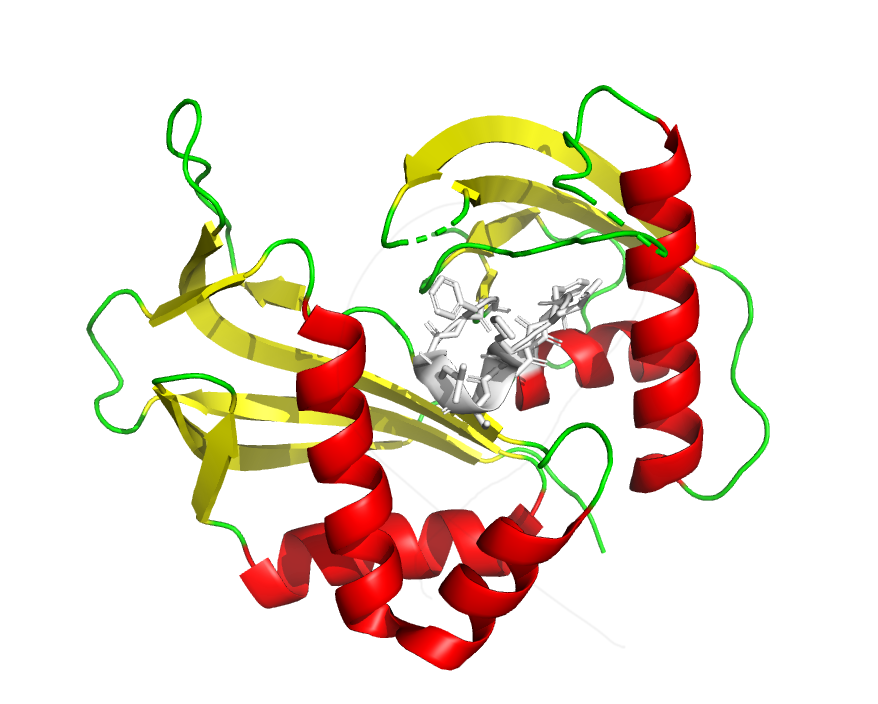 Estructura de la proteïna Cas6 de Pyrococcus Furiosus. En vermell estan identificades les hèlix alfa, en groc les làmines beta, en verd els girs i en blanc el bucle ric en glicina característic de la proteïna. En aquest bucle també hi són representades les cadenes laterals dels aminoàcids. Imatge obtinguda a partir de la seqüència d'aminoàcids extreta del PDB tractada amb el software PyMOL